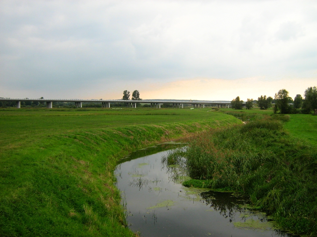 Der Große Landgraben mit der Talbrücke der Bundesautobahn A20 (Landkreis Demmin, Mecklenburg-Vorpommern)